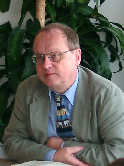 Michael Wolter, visit at the CJD Christophorusschule Königswinter